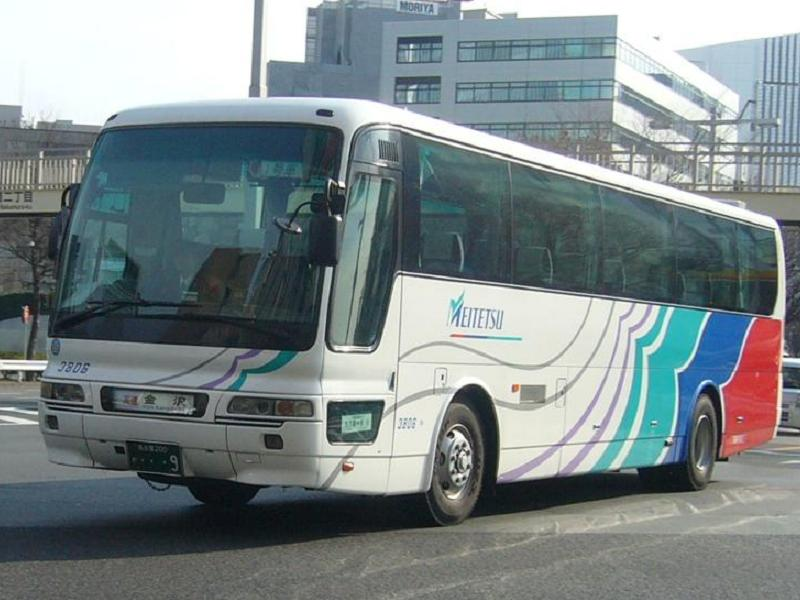 登録番号 名古屋200か・・・9 名鉄バス所属 車番3806 高速用車両 （各系統で共通運用） 2006年12月31日 名鉄バスセンター入口付近にて撮影 撮影者 Tokatsu kokubu